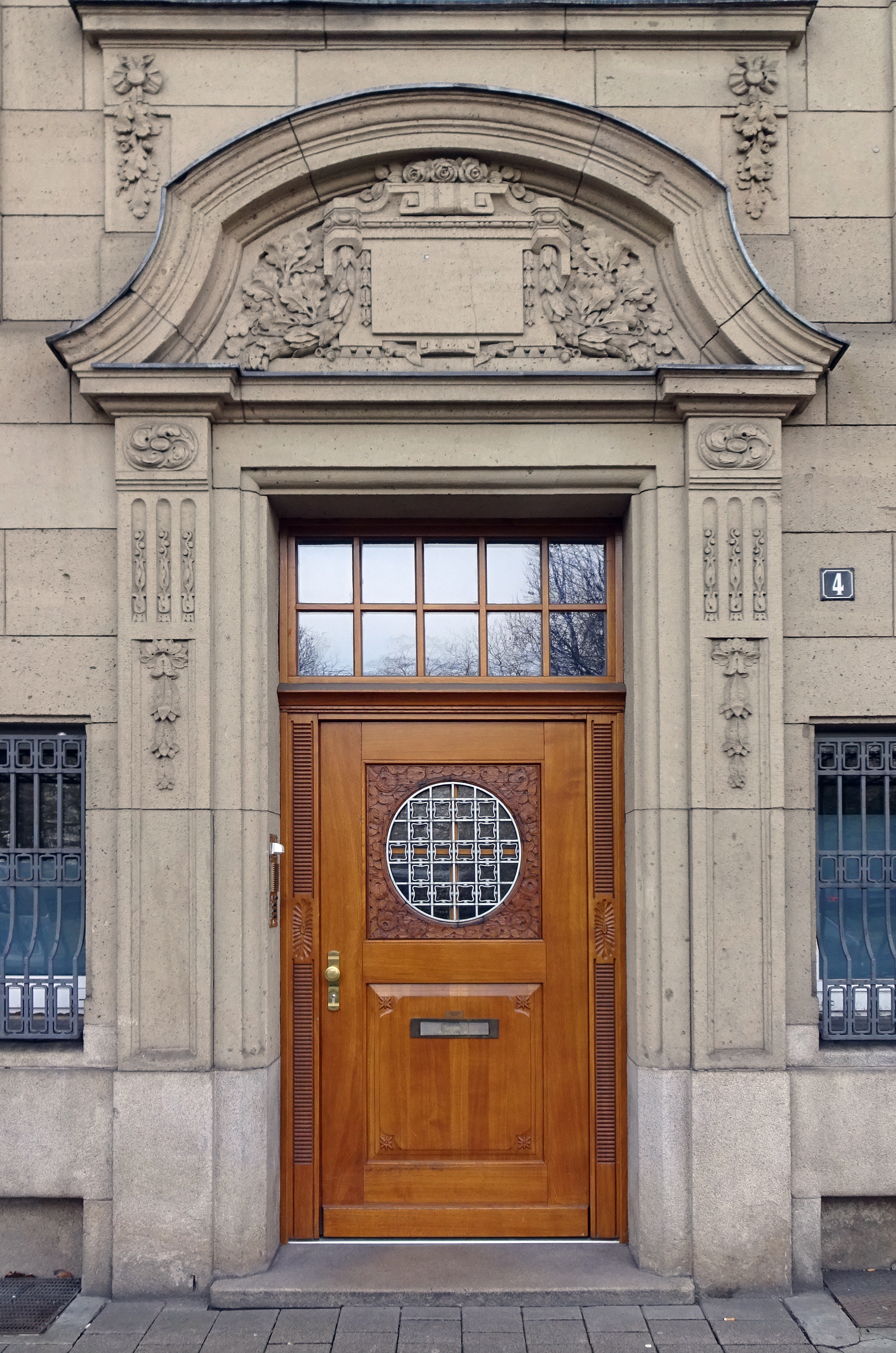 Haustür Heinrich-Heine-Allee 4, Düsseldorf-Altstadt